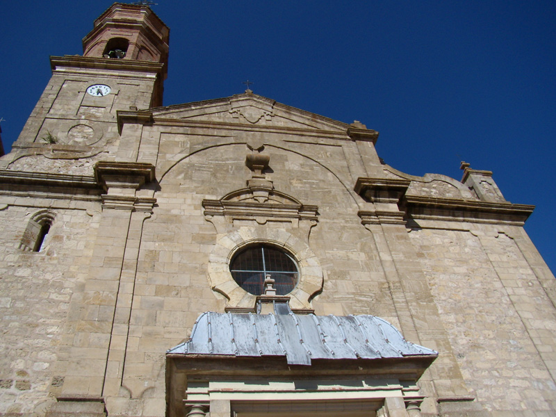 Fachada principal de la Igelsia de San Millan